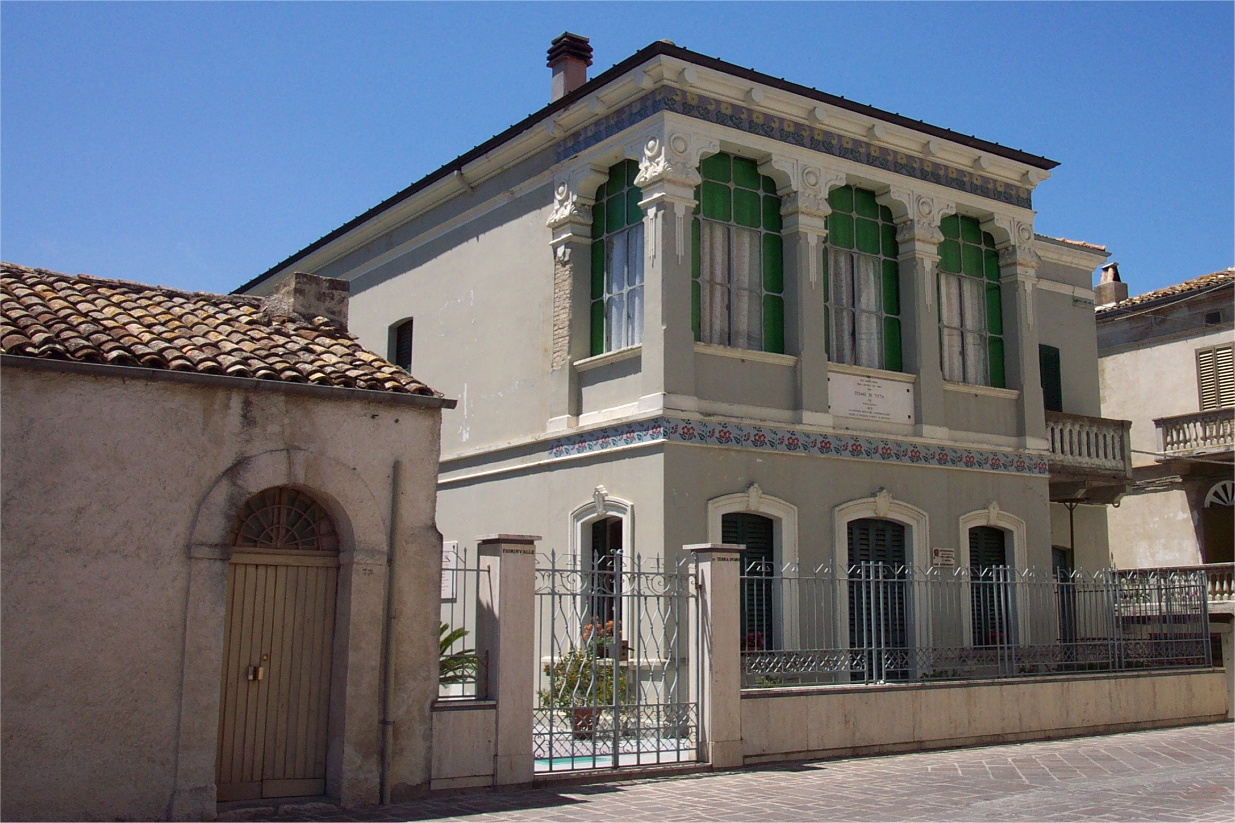 Fiorinvalle di Terra d'Oro, villa in cui è vissuto Cesare De Titta, sulla sinistra scorcio della sua casa natale